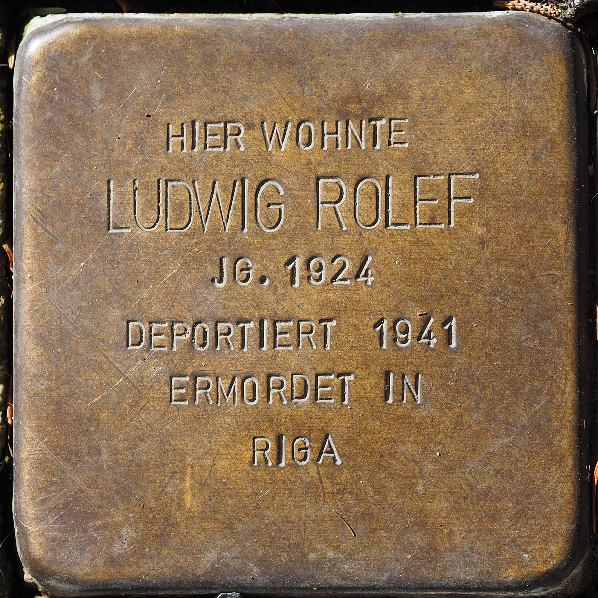 Stolpersteine MG: Rolef, Ludwig